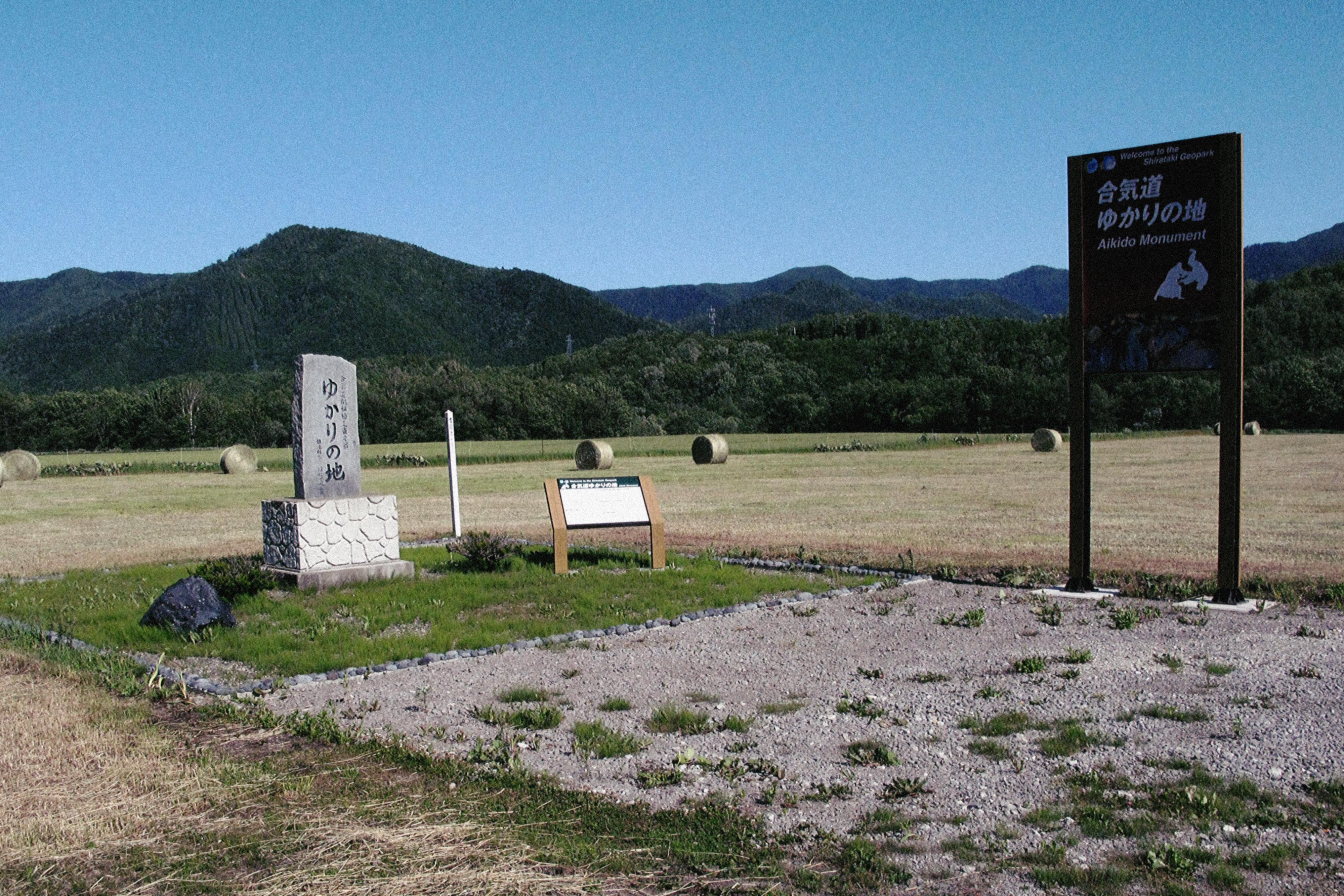 合気道開祖の植芝盛平が1912年から1919年まで入植した北海道上湧別村白滝原野基線235番地に、当時の白滝村が1983年に建立した「ゆかりの地」碑。